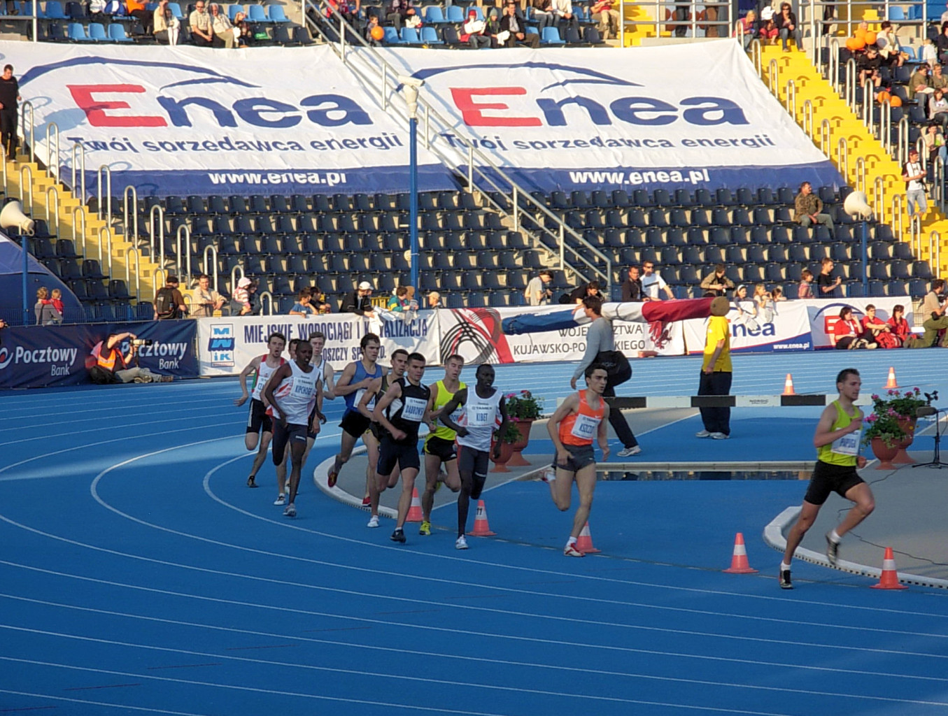 Miting lekkoatletyczny Enea Cup na stadionie Zawiszy Bydgoszcz w 2009 roku